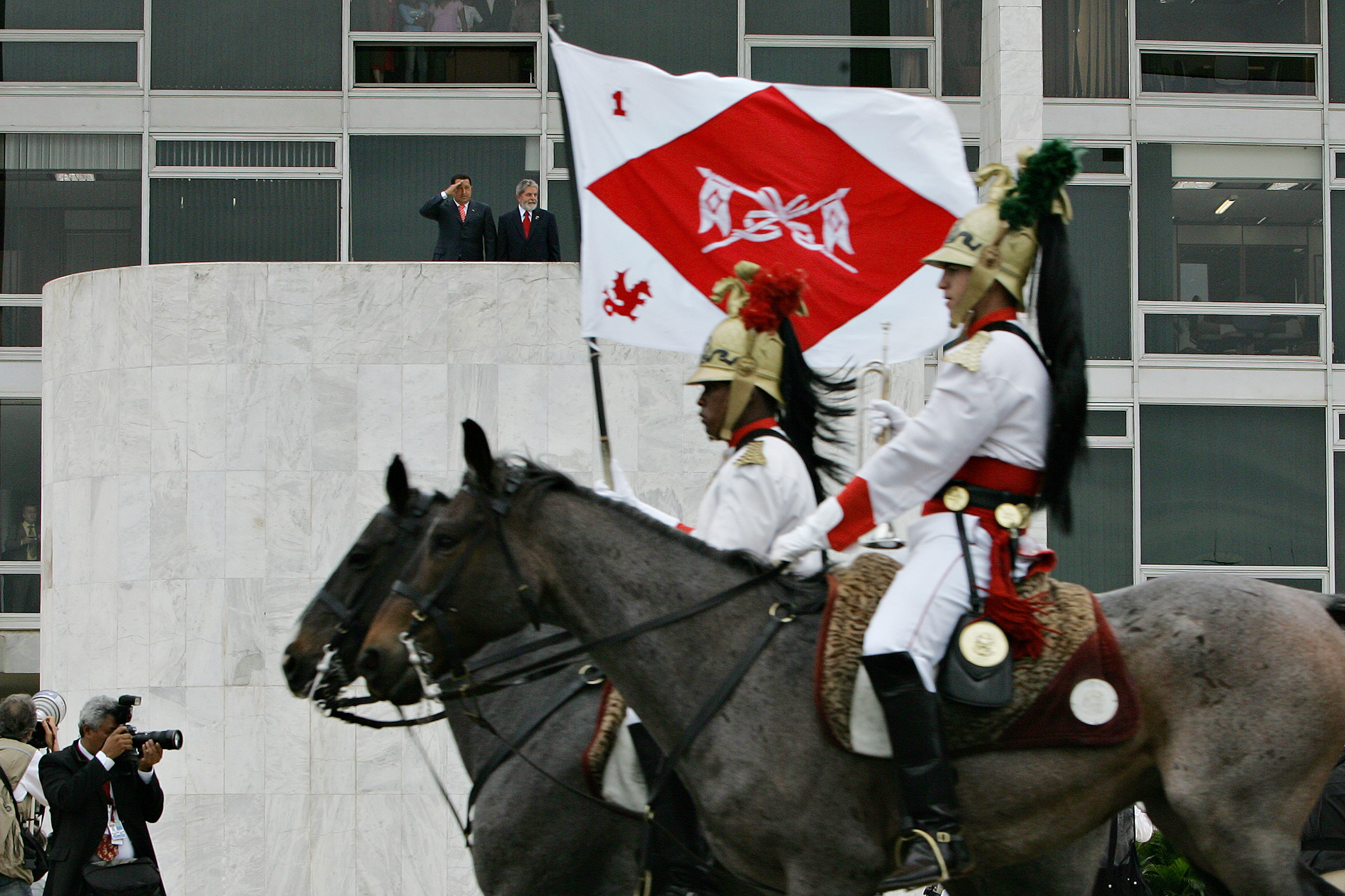 Brasília - Presidente Lula e o presidente da Venezuela assistem, do Parlatório, desfile dos Dragões da Independência.